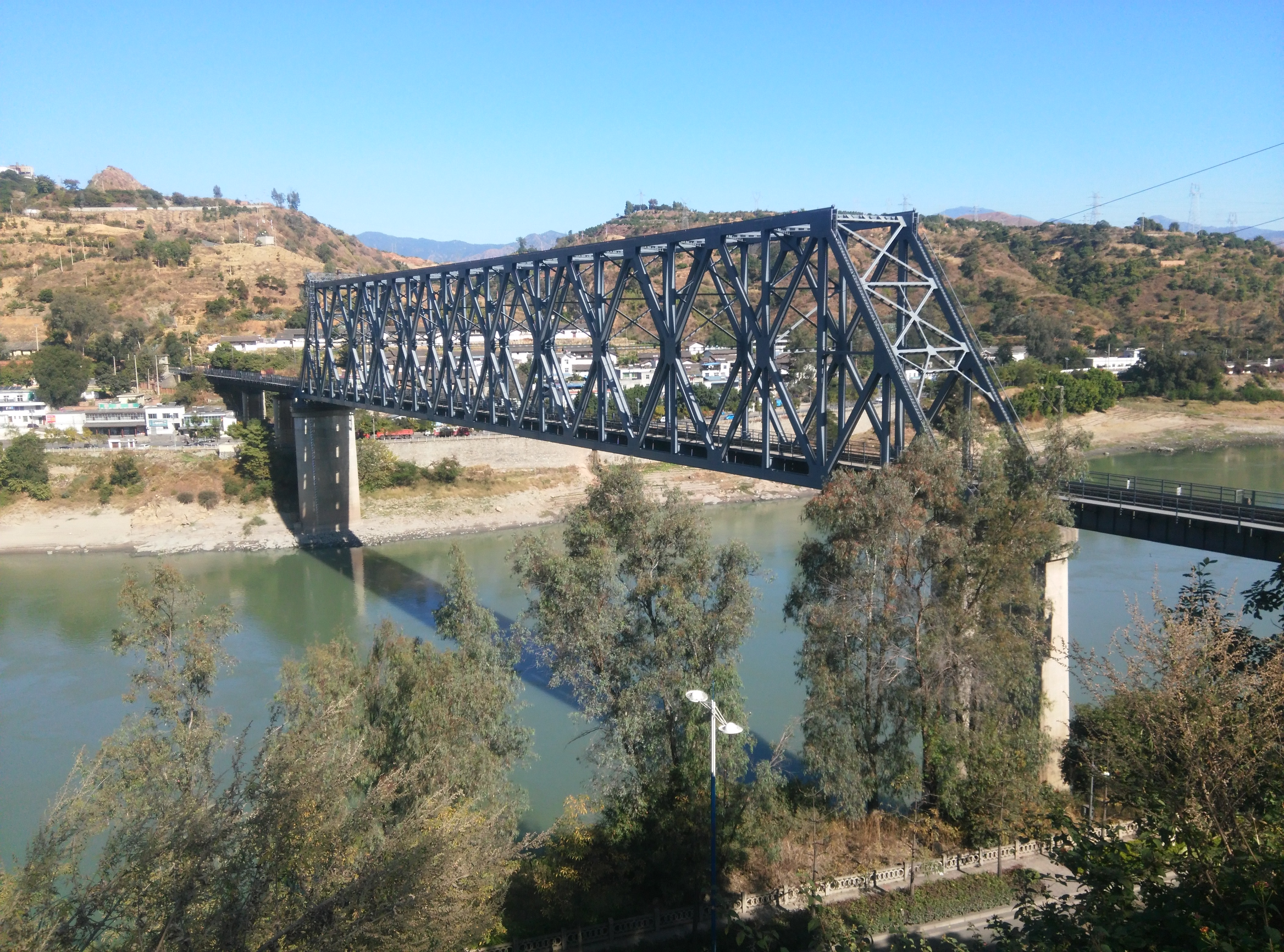 烈日下的成昆铁路金沙江大桥，建成于1969年。大桥主跨192米，桥上承载单线铁路。成昆铁路金沙江大桥自1969年至1995年间是长江最上游的铁路跨江大桥。